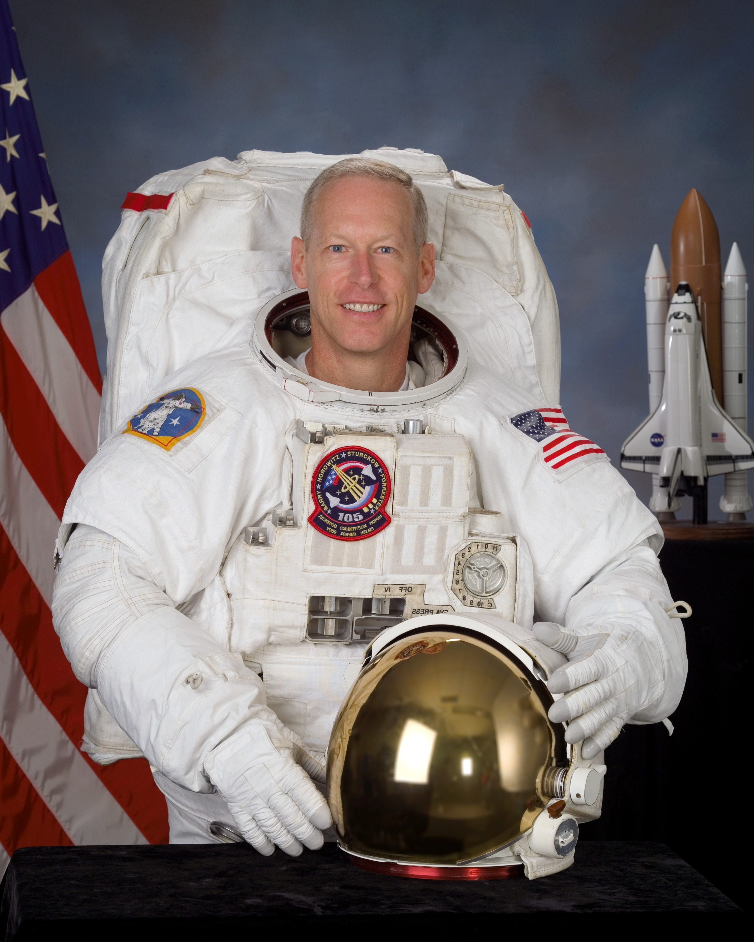 portrait astronaut Patrick G. Forrester